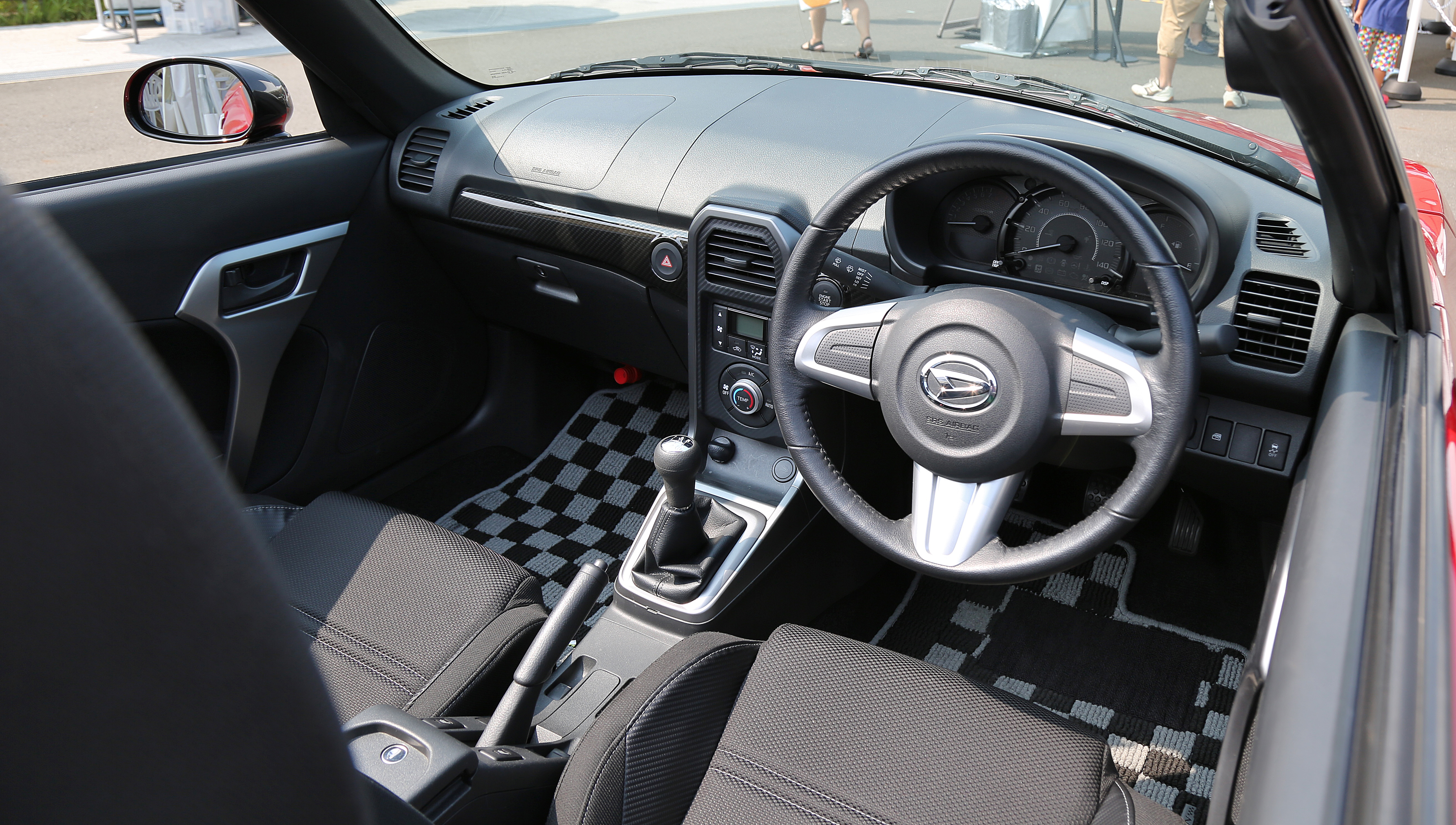 Daihatsu Copen Robe